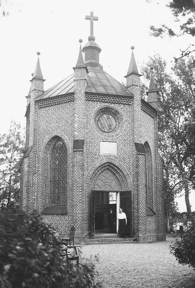 Pyhän Henrikin kappeli Kokemäen Ylistarossa Kokemäen Raittius- ja sivistysseuran juhlapäivänä. Ovella Fanny Maria Koskinen.